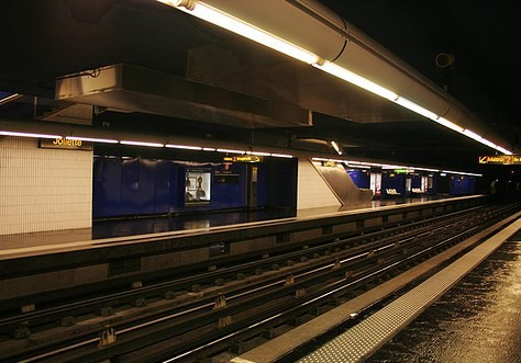 Station "Joliette" de la ligne 2 du métro de Marseille.